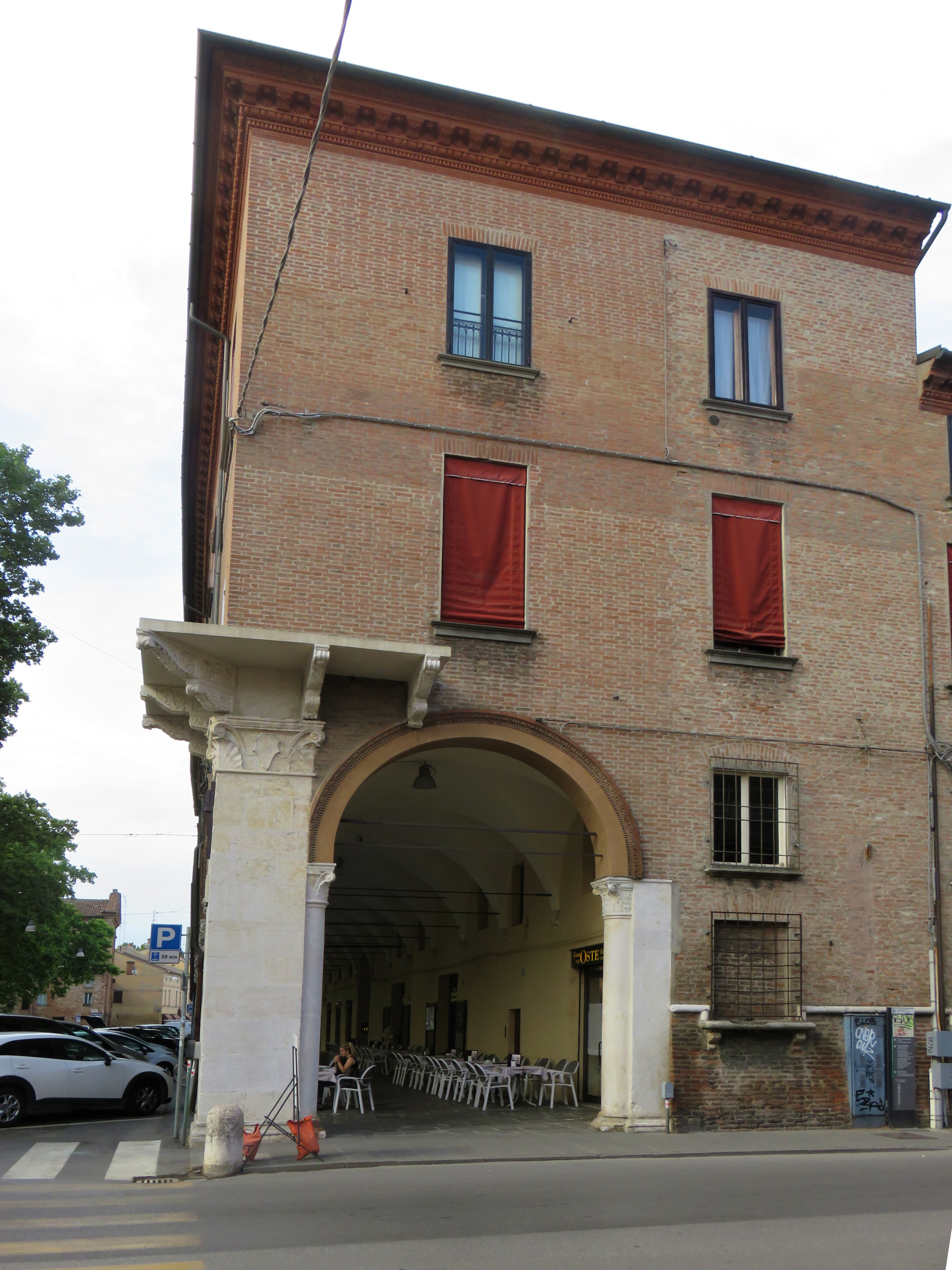 Palazzo Bevilacqua-Mazzucchi o Strozzi-Bevilacqua all'angolo tra corso Porta Mare e piazza Ariostea